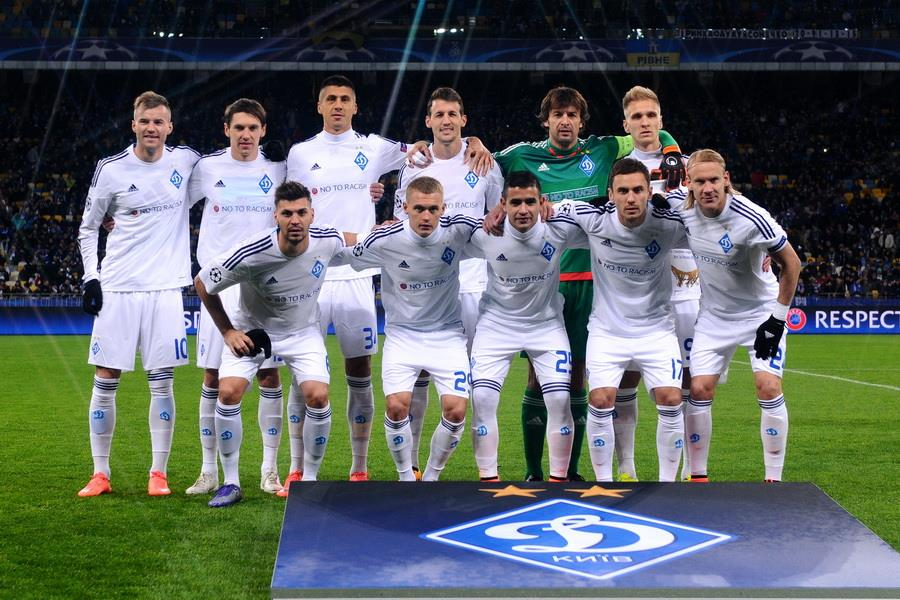 25.2.2016. Украина, Киев, стадион «Олимпийский». Лига Чемпионов УЕФА, «Динамо Киев» — «Манчестер Сити».